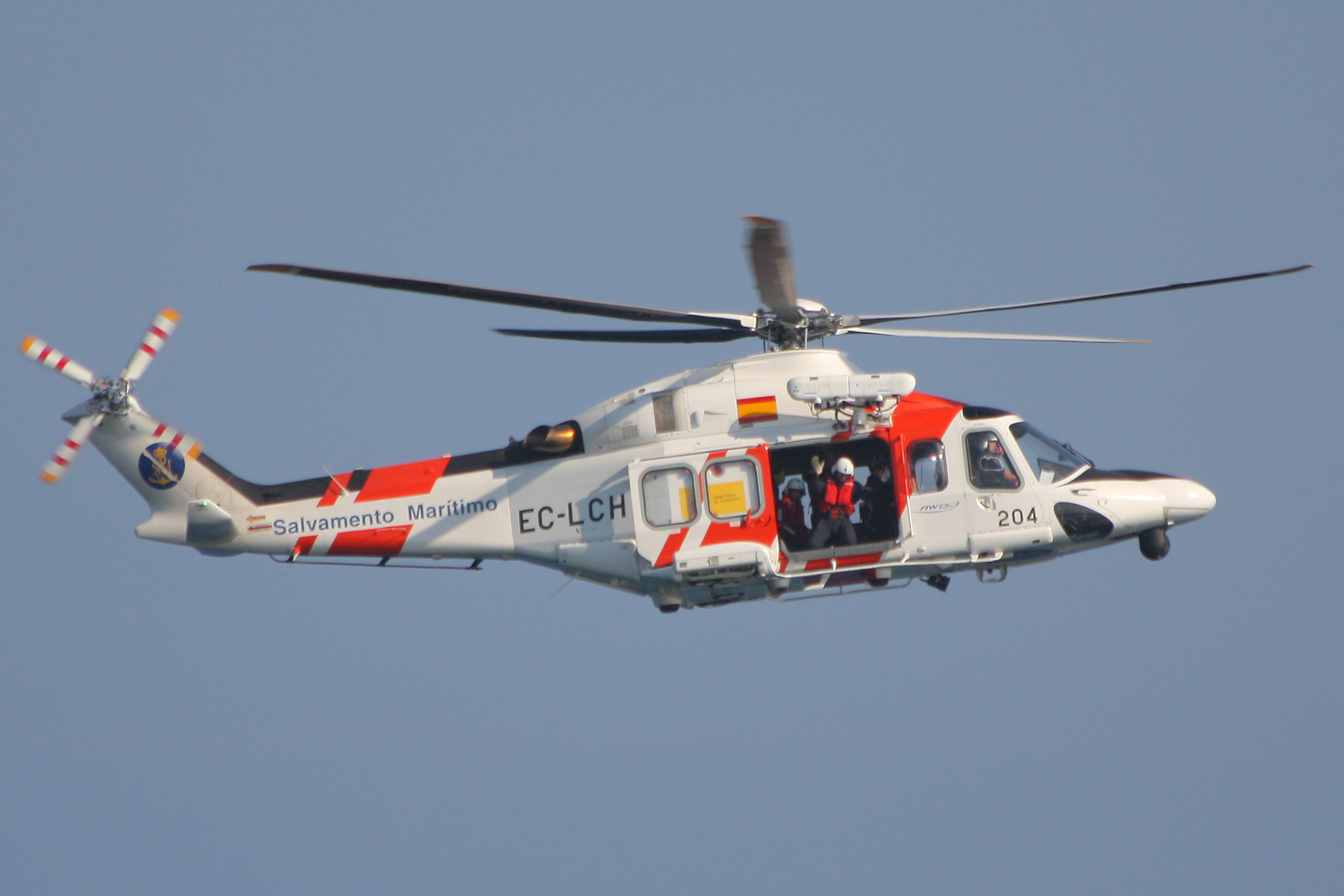 Helimer (Rescue Helicopter). SASEMAR - Spain.